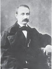 Federico Stefani